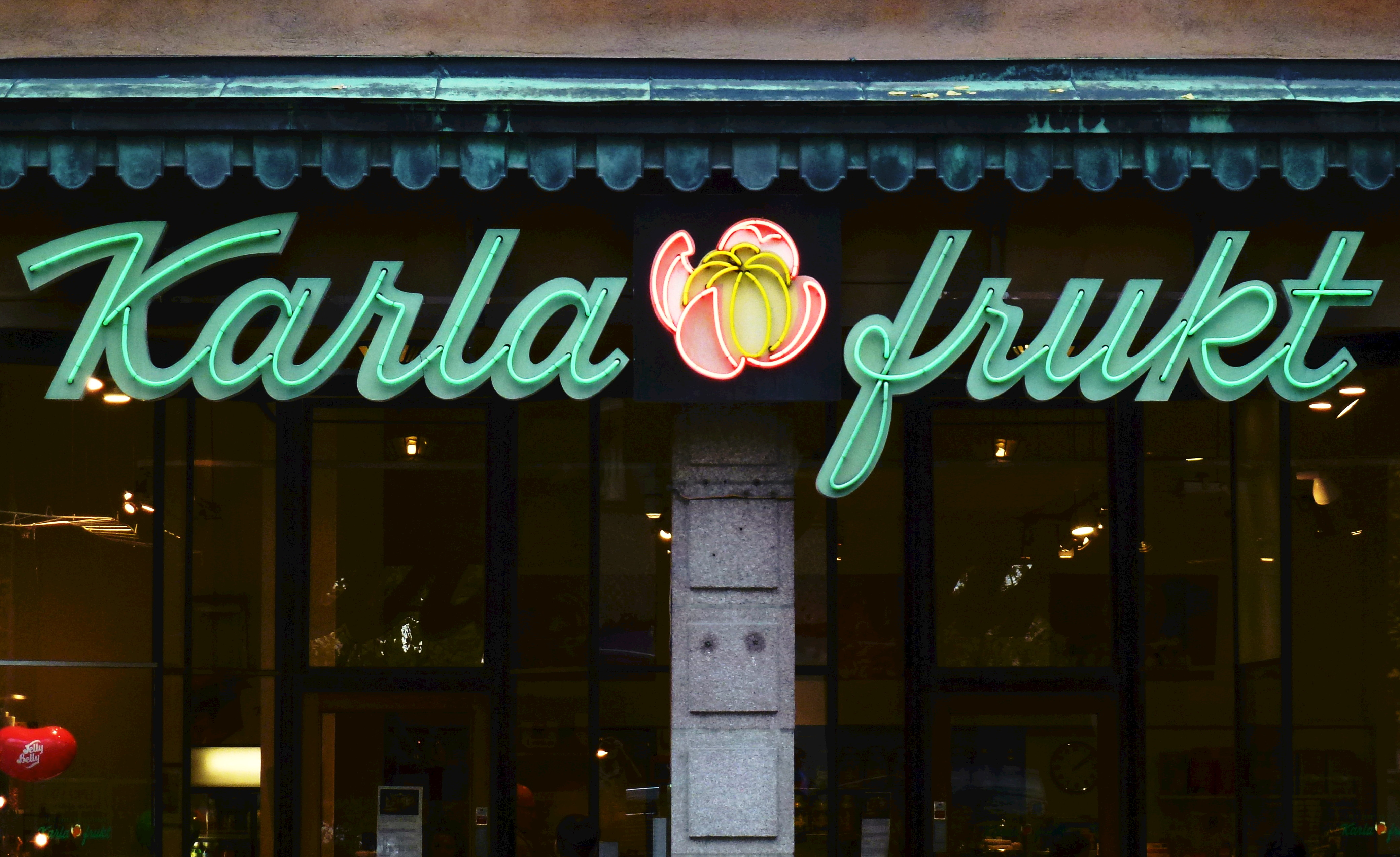 Karla frukts neonskylt, Karlavägen 72, Stockholm